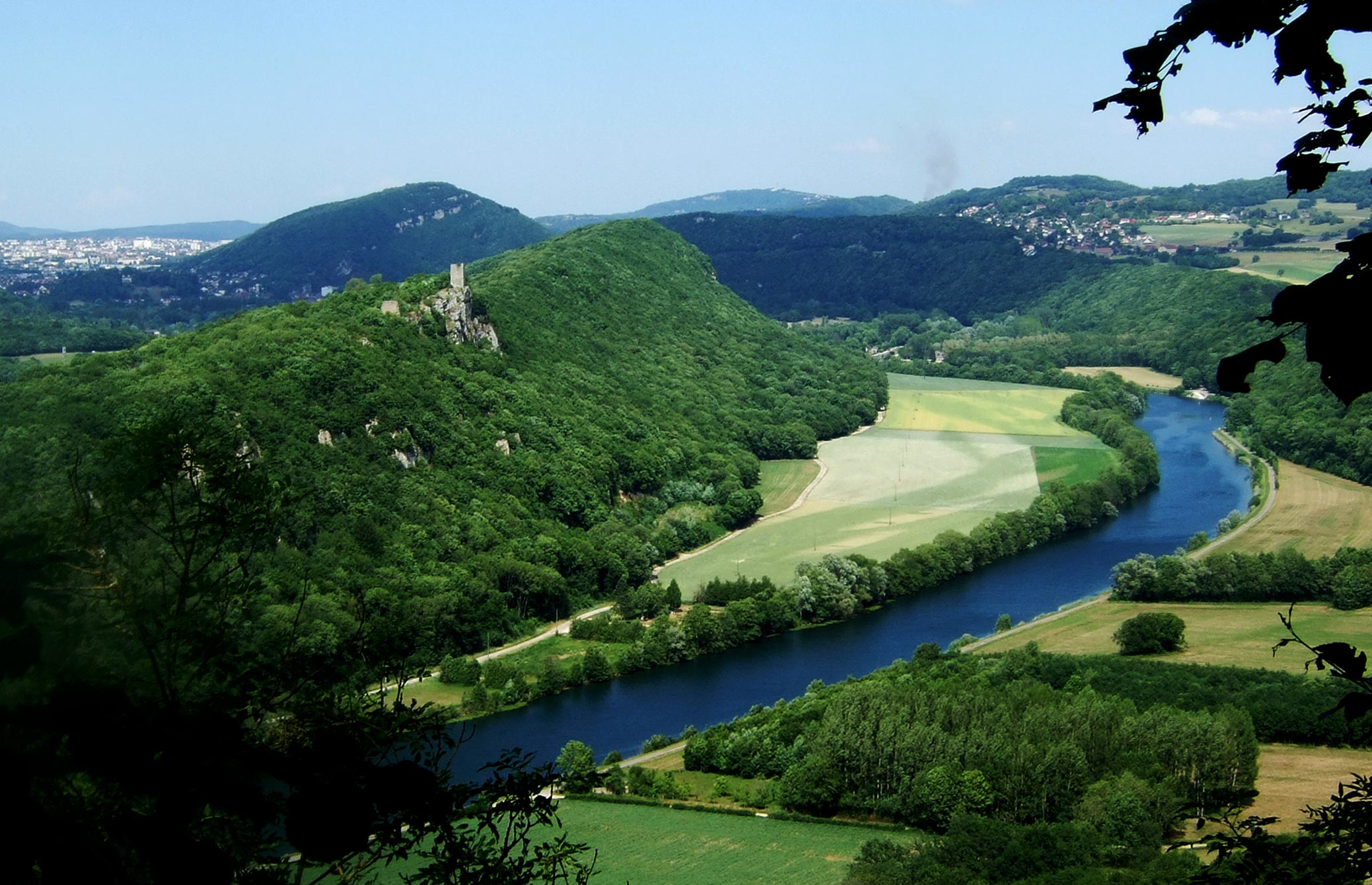 Vue de la Tour médiévale de Montferrand-le-Château surplombant la rivière du Doubs. A l'horizon à gauche: la ville de Besançon, préfecture du département du Doubs.